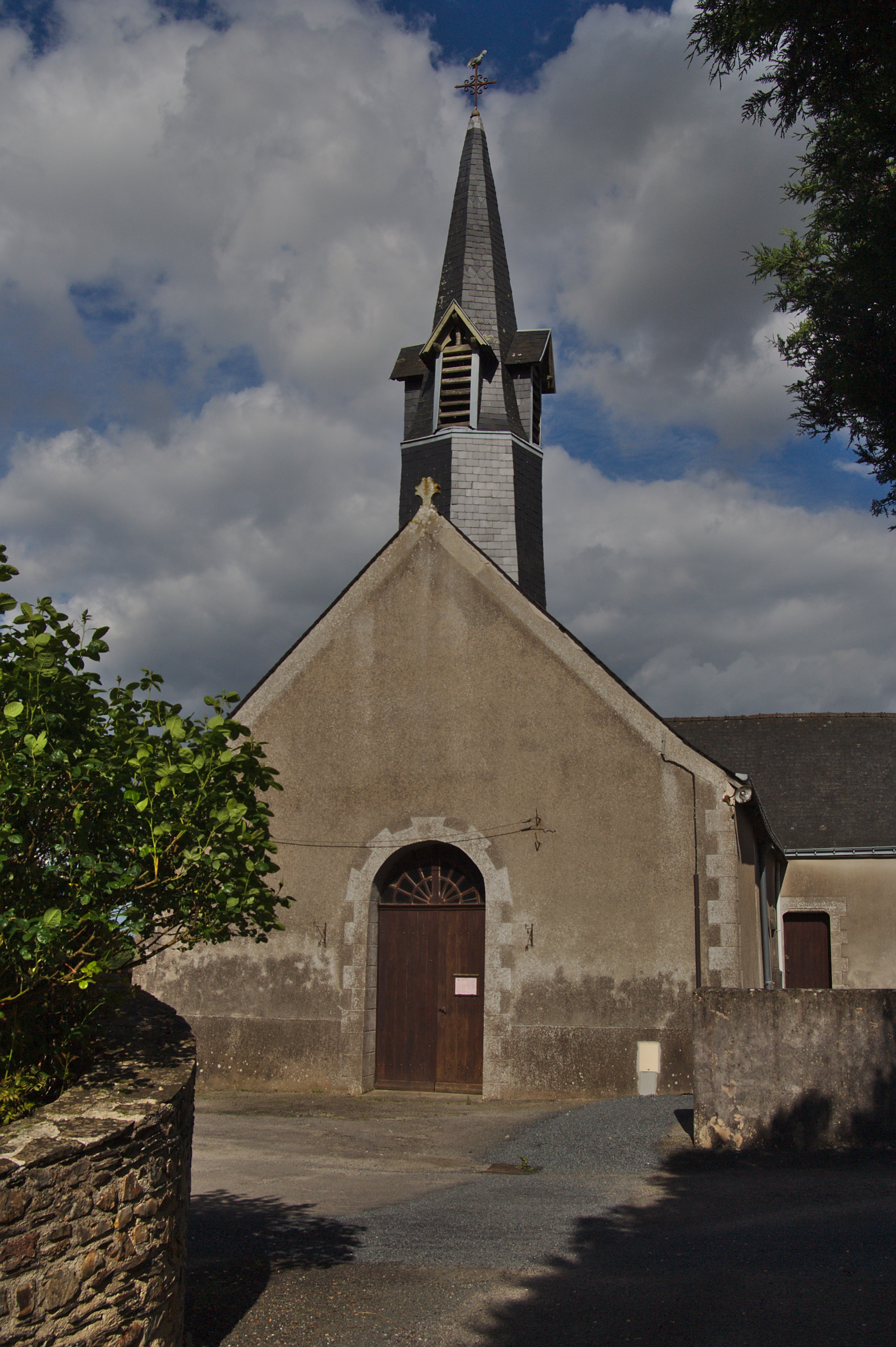 Église de Saint-Erblon.